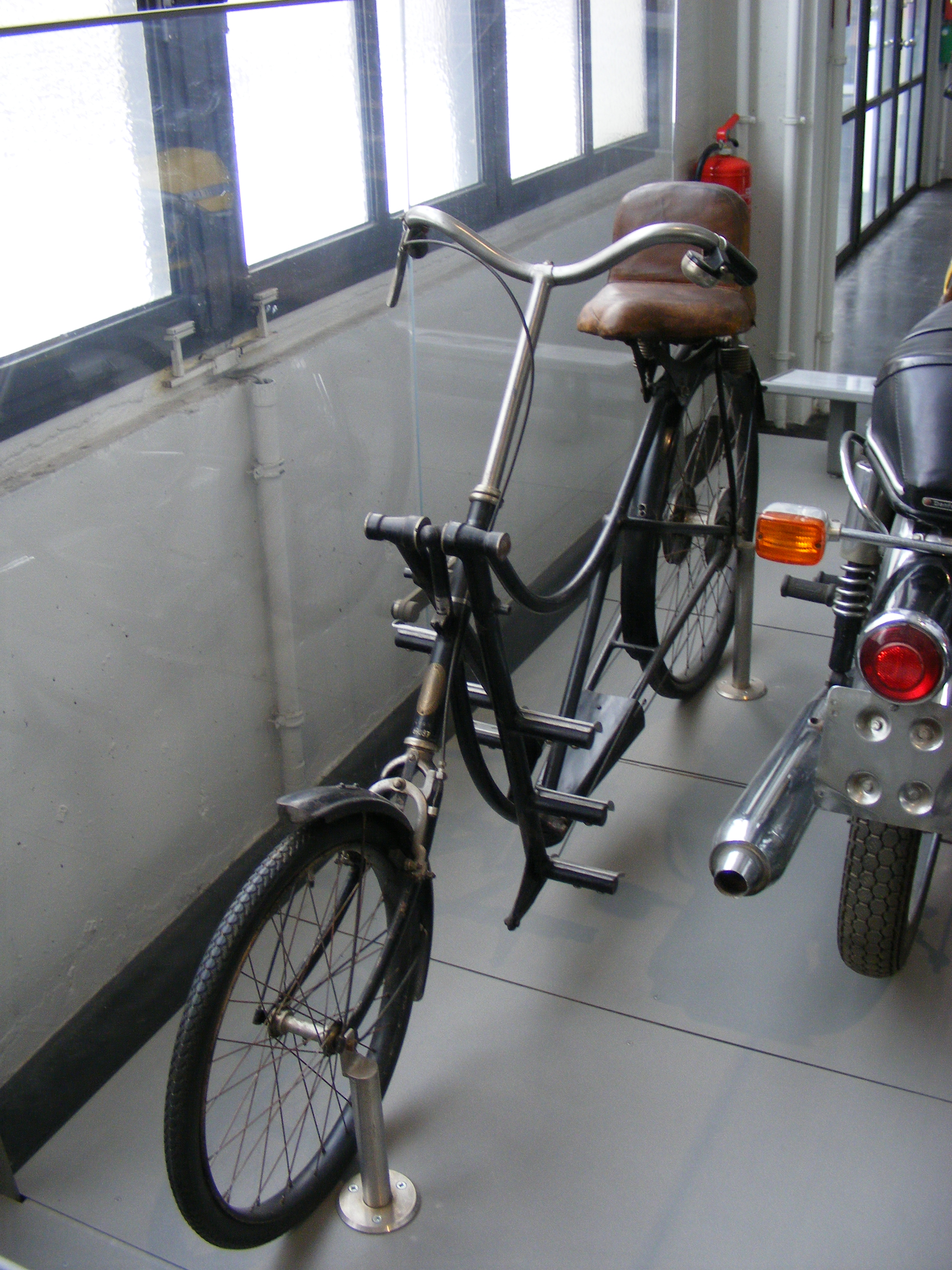 Jaray-Rad mit Schwingpedalen, auch bekannt als "Sesselrad" (Umsetzung der Erfindung der Schwingpedale von Paul Jaray), Masse: 24 kg, Bj.: 1925, Anzahl der verkauften Exemplare: 2000, Hersteller: Hesperus-Werke, Stuttgart — Exponat im Deutschen Museum Verkehrszentrum München, Halle III, Inv.-Nr. 68087.